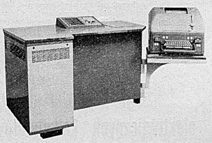 Komputer Geo-1